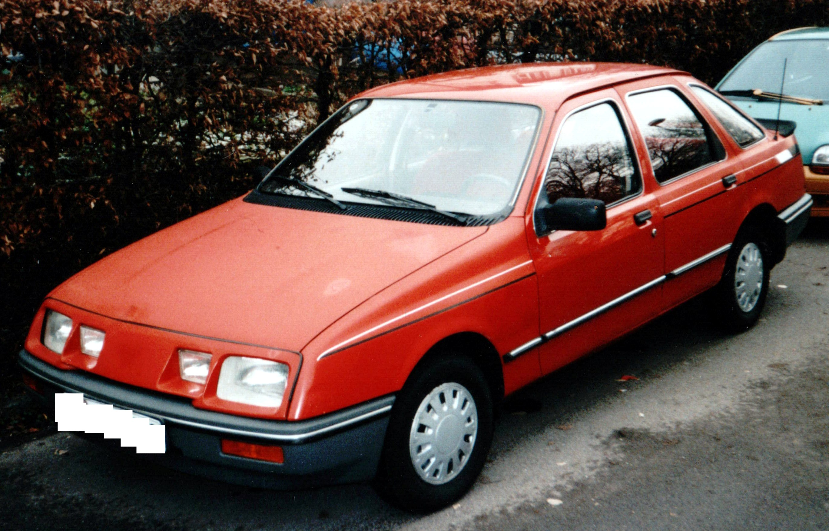 Ford Sierra 1983